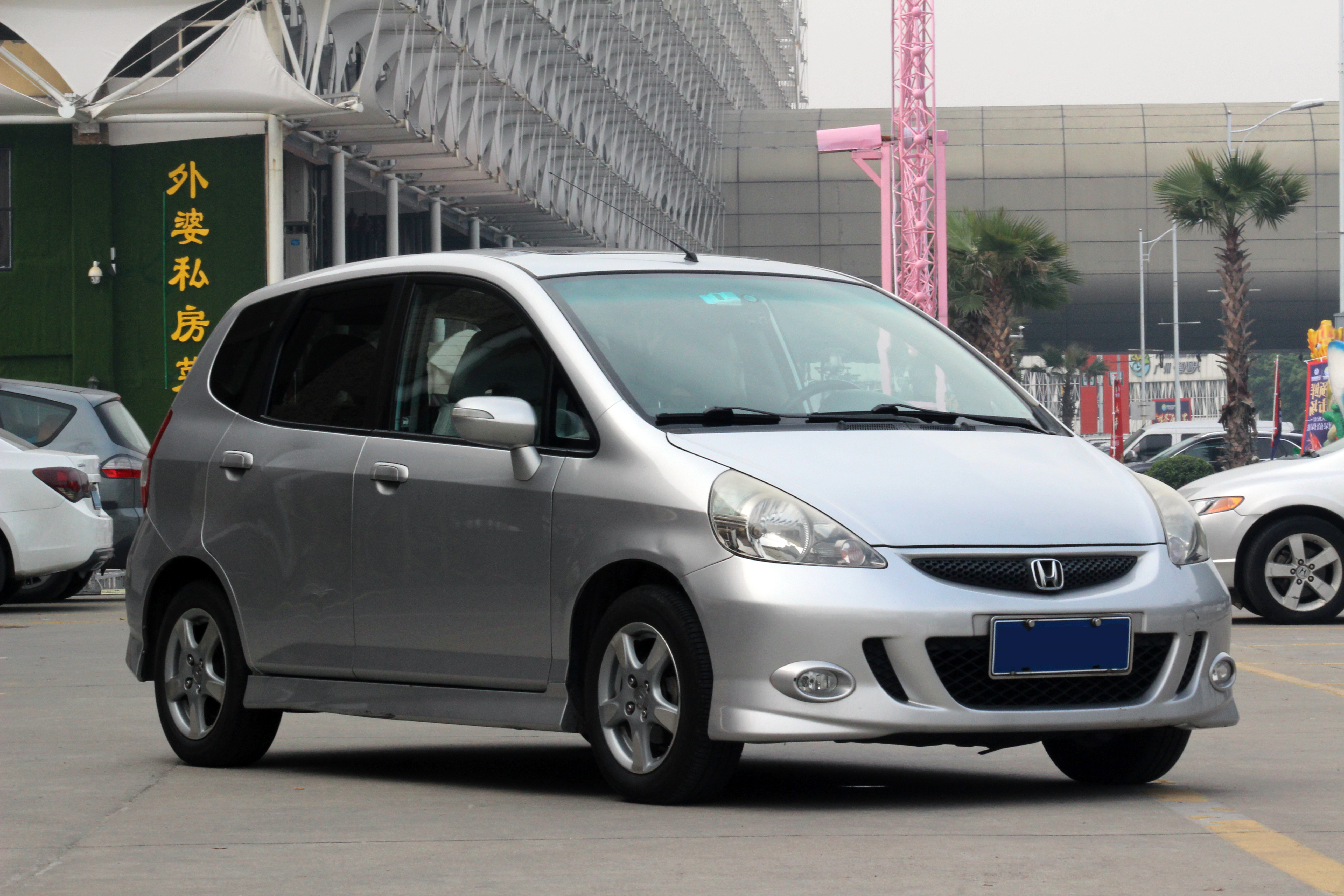 广汽本田第一代飞度后期型